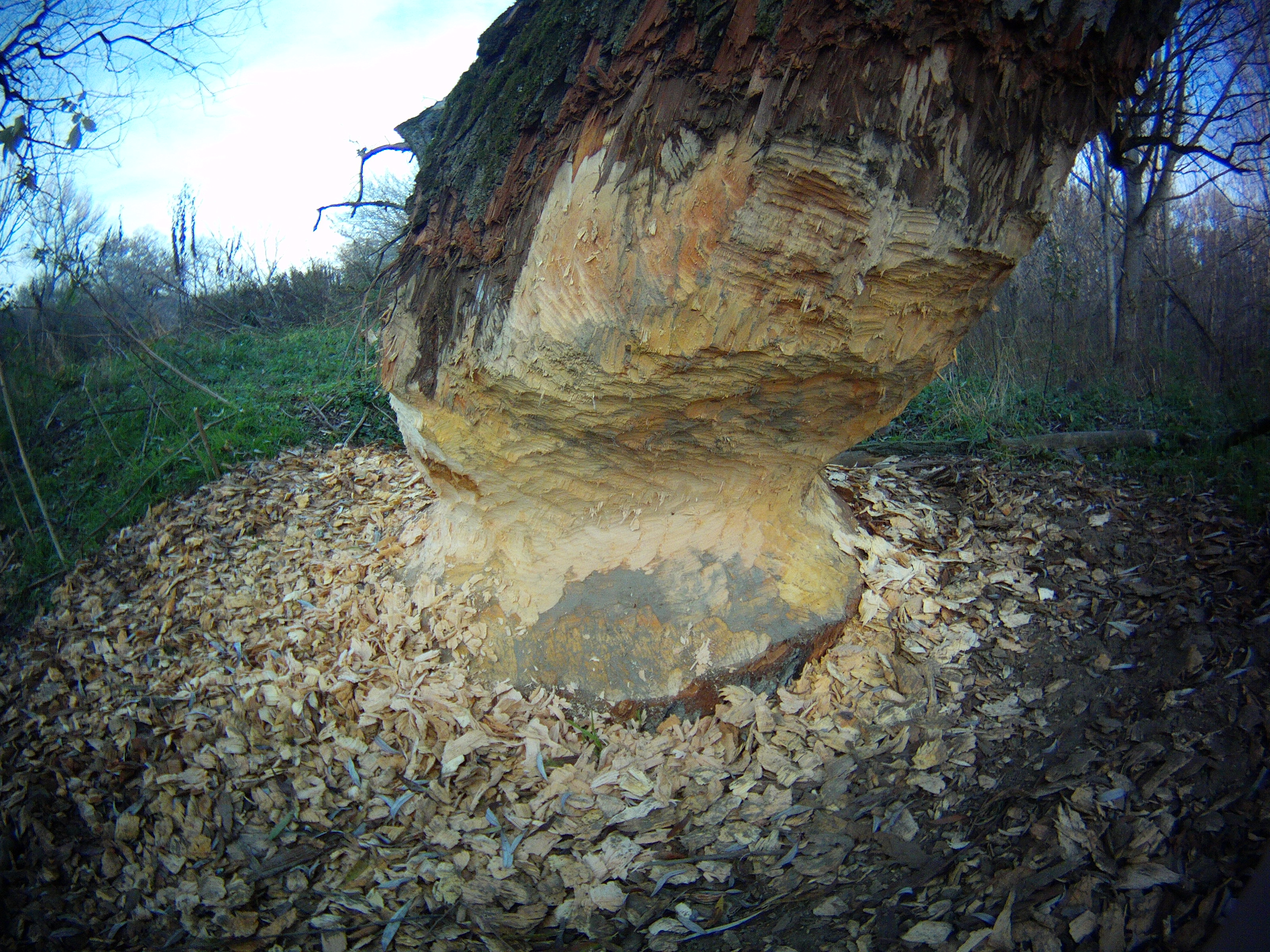 Strom ohlodaný bobrem